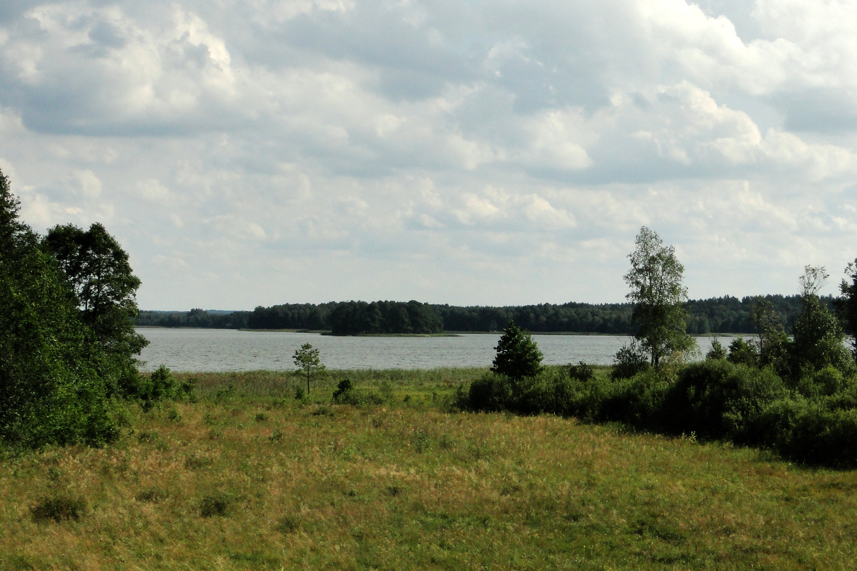 Jezioro Zdróżno, okolice Starych Kiełbonek